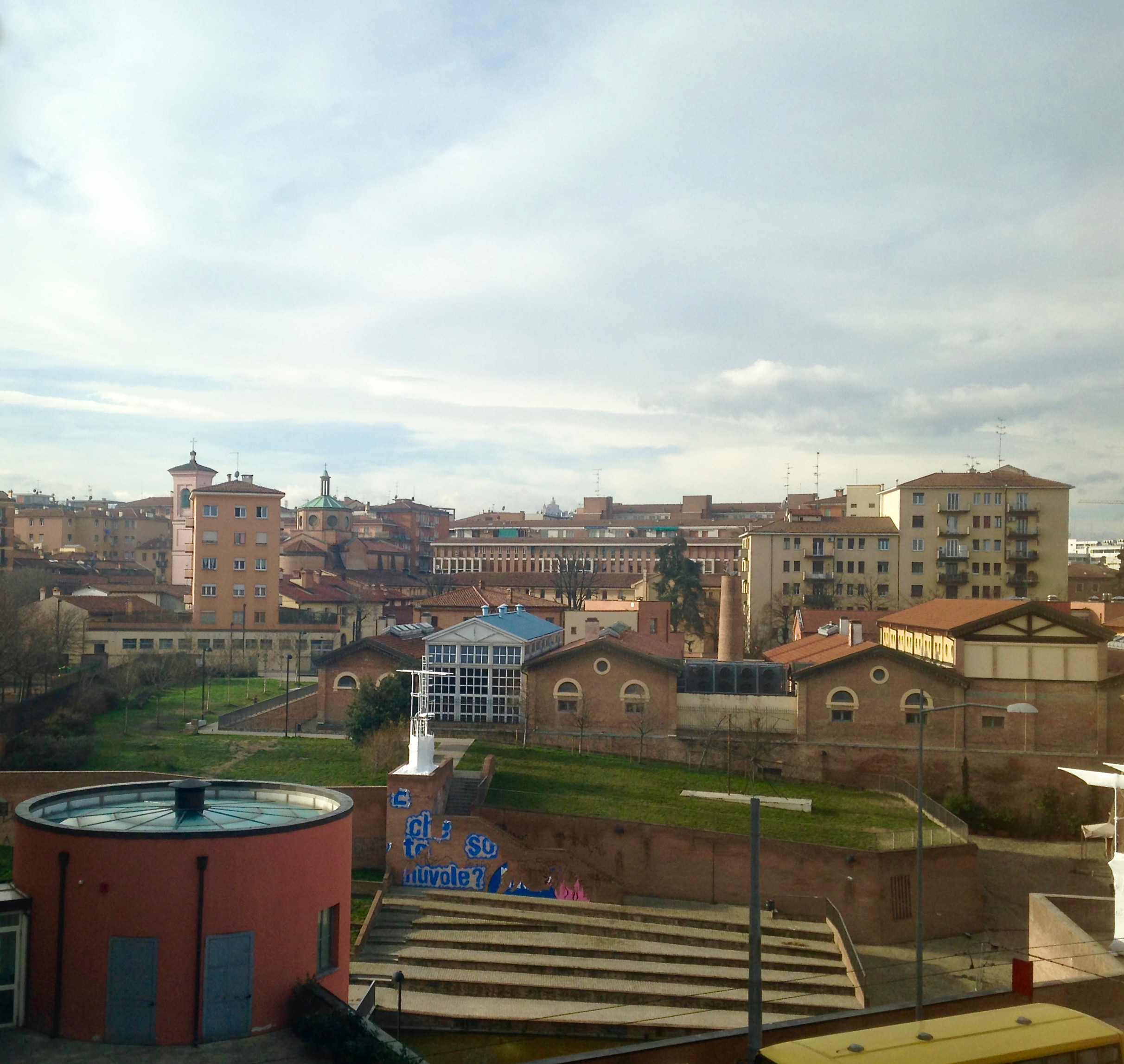 Una veduta sul Quartiere Porto, Bologna.